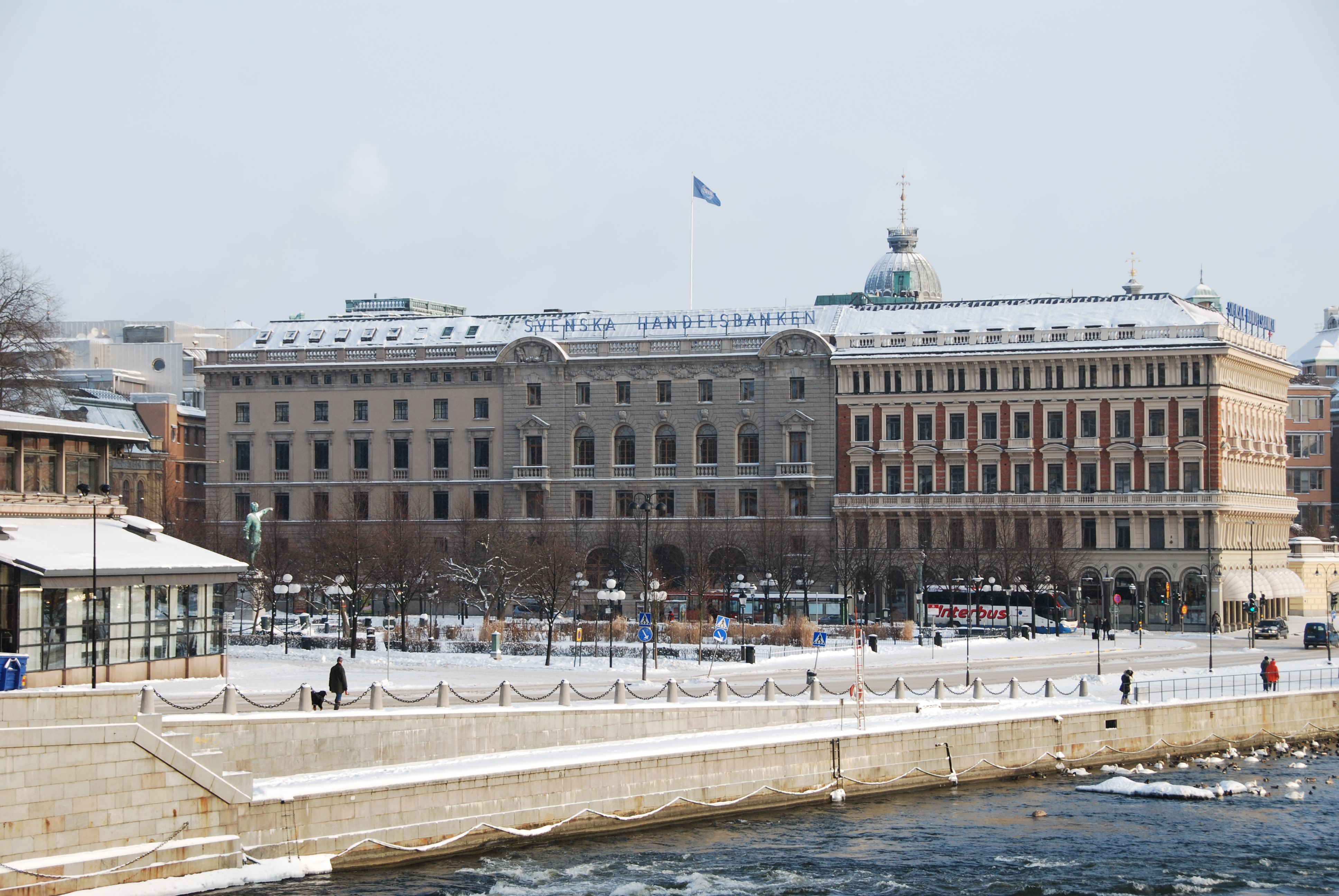 Svenska Handelsbanken vid Kungsträdgårdsgatan i Stockholm. Från vänster; uppfört 1921, 1905 och 1886.